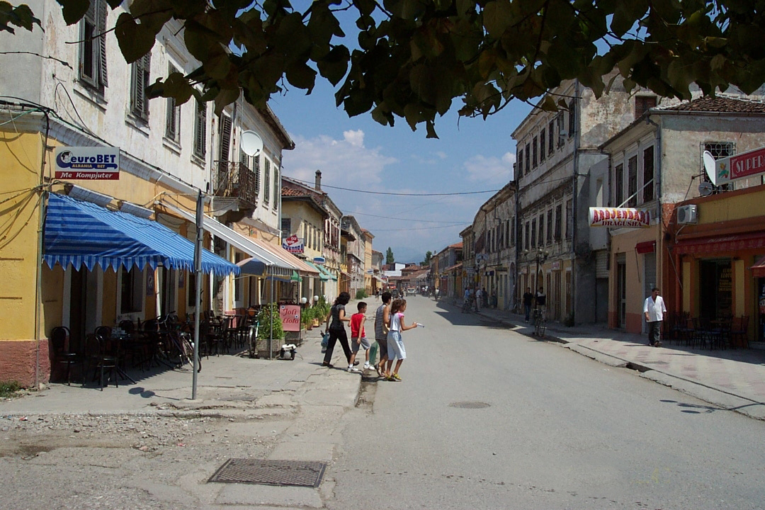 Ulice ve městě Skadar, na severu Albánie